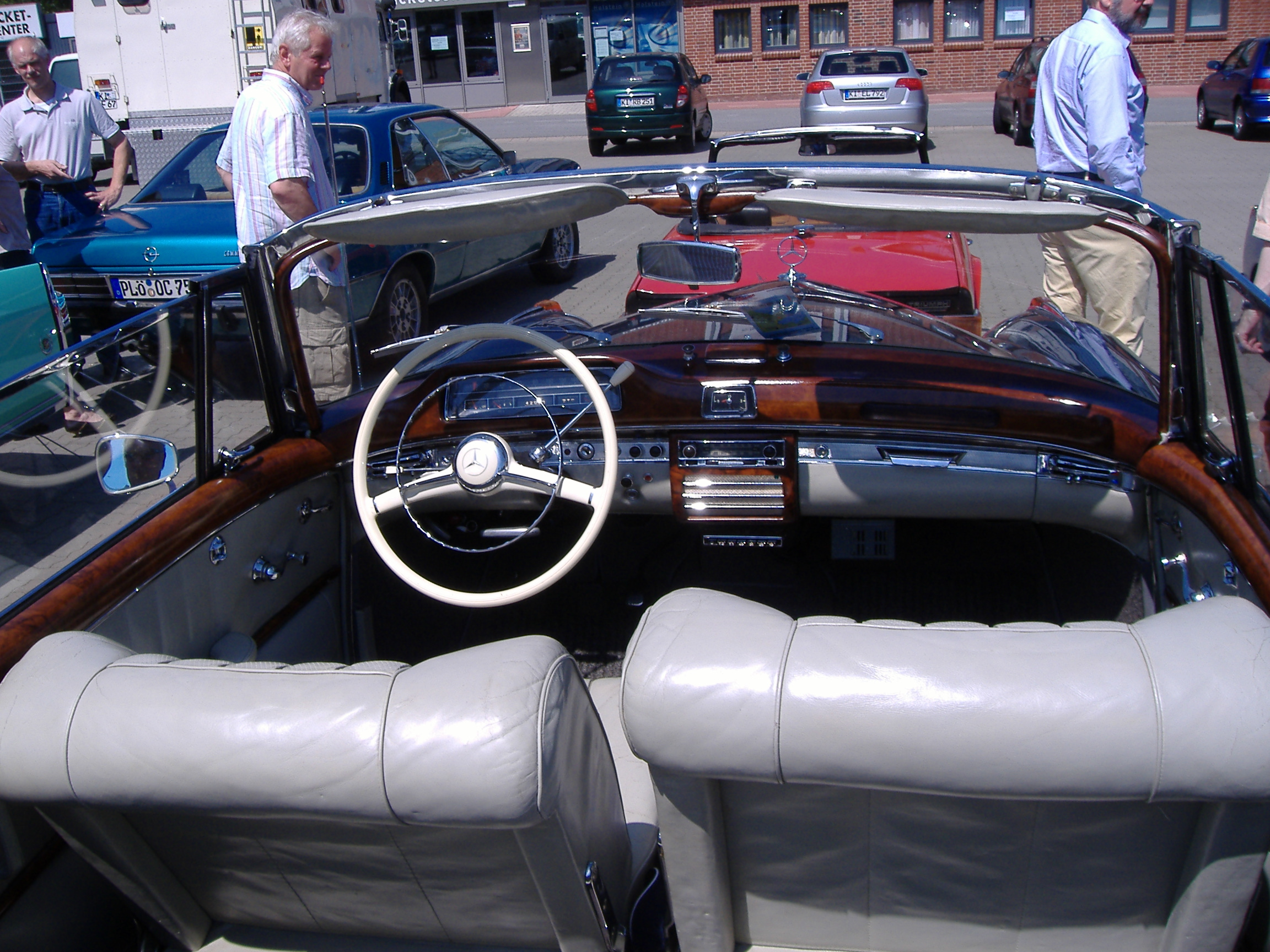 Mercedes-Benz 220S Cabriolet Cockpitansicht